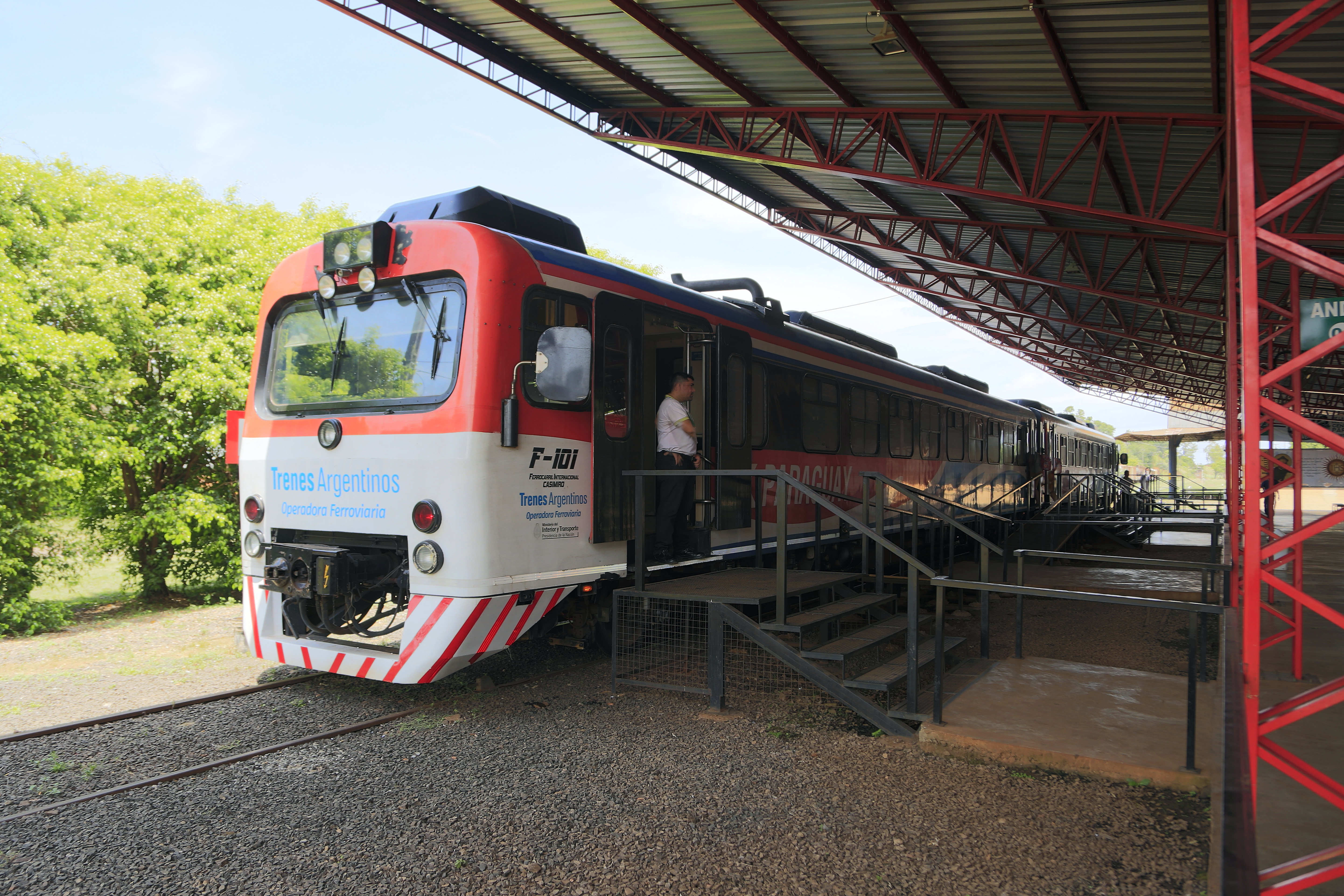 Triebwagen von und nach Posadas am ebenso improvisieten Bahnsteig. Der Vorteil der recht kurzen Eisenbahnverbindung über die Grenze ist die nur einmalige, gemeinsame Grenzabfertigung in Posadas.HDR